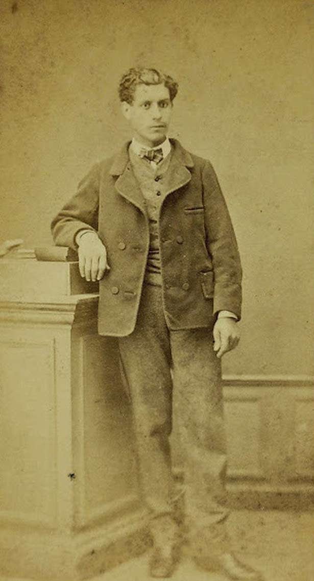 Photographie / carte de visite représentant peut-être Isidore Ducasse (1847-1870), portrait exécuté à Tarbes en 1867 par le studio Blanchard, place Maubourguet. Ce document a été retrouvé par Jean-Jacques Lefrère à Bagnères-de-Bigorre en 1977 chez des descendants de la famille de Georges Dazet (1852-1920), fils de Jean Dazet, le tuteur de Ducasse.